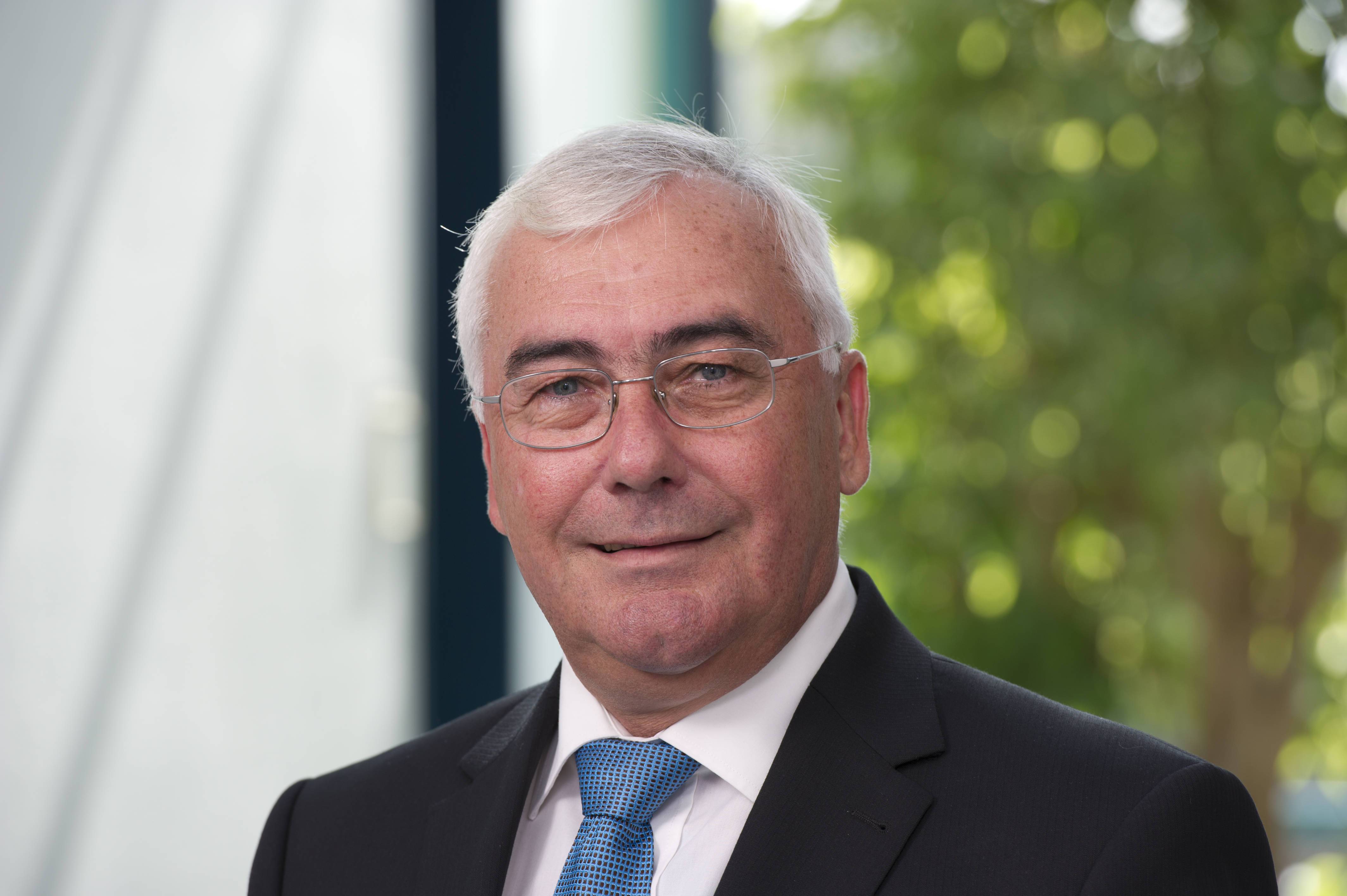 Josef Falbisoner